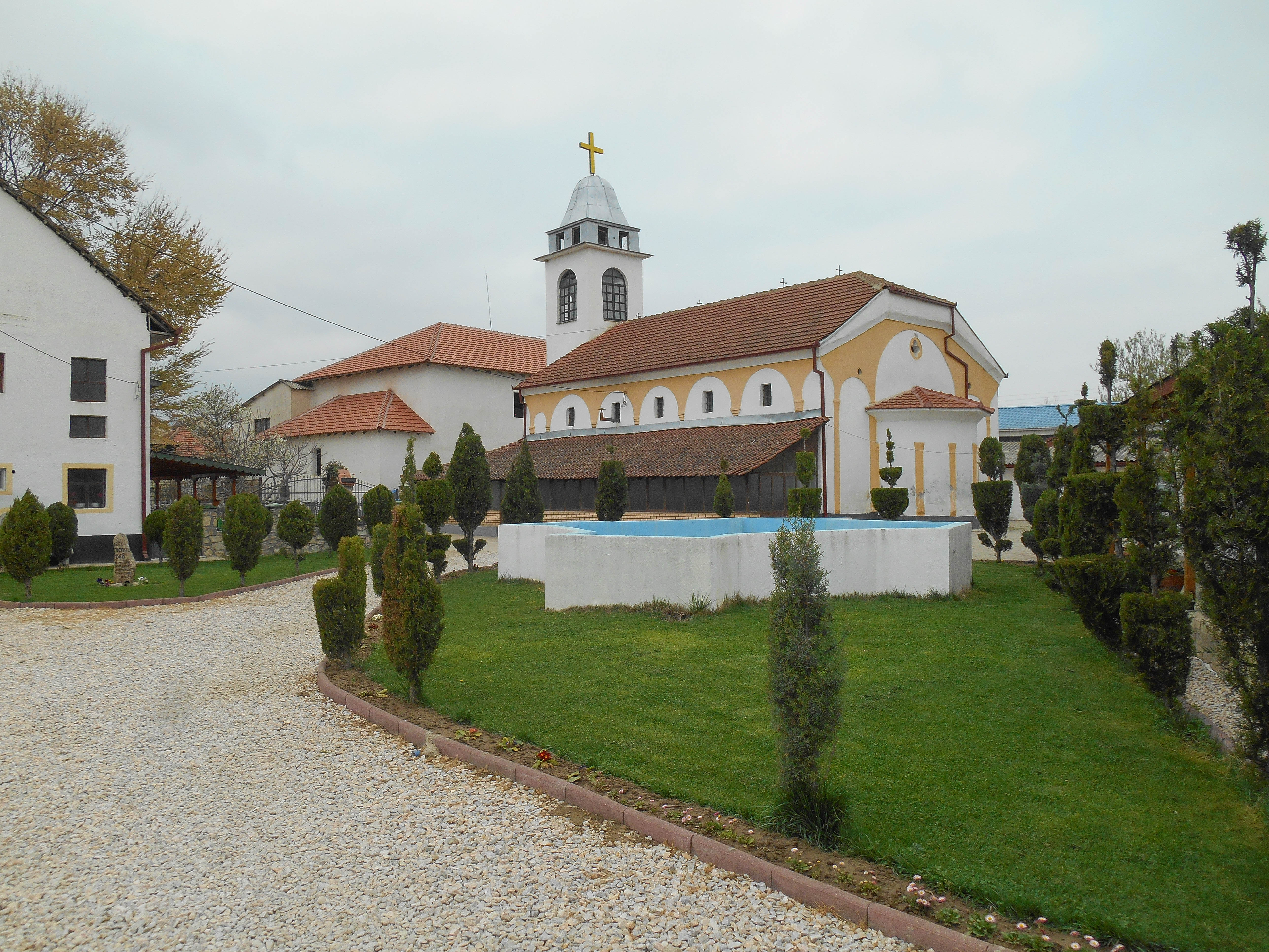 Црквата Света Троица - Давиље